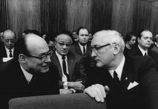 Zentralbild Junge 19.11.1970 Berlin: 26. Sitzung des Staatsrates. Der Stellvertreter des Vorsitzenden des Ministerrates und Minister für Gesundheitswesen, Max Sefrin, im Gespräch mit Prof. Dr. Manfred von Ardenne, der neben weiteren Persönlichkeiten an der Beratung teilnahm. Minister Sefrin begründete einen vom Ministerrat vorgelegten Bericht und Beschlußentwurf über den Stand der medizinischen Forschung und die Entwicklung der Wissenschaftsorganisation in der Medizin.